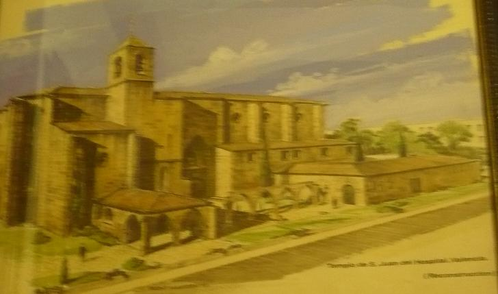 Reproducción de un cuadro público donde se recrea un posible aspecto del antiguo conjunto hospitalario.